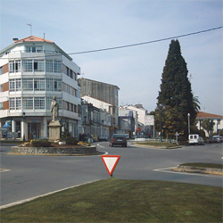 Entrada de Santa Comba, Galicia